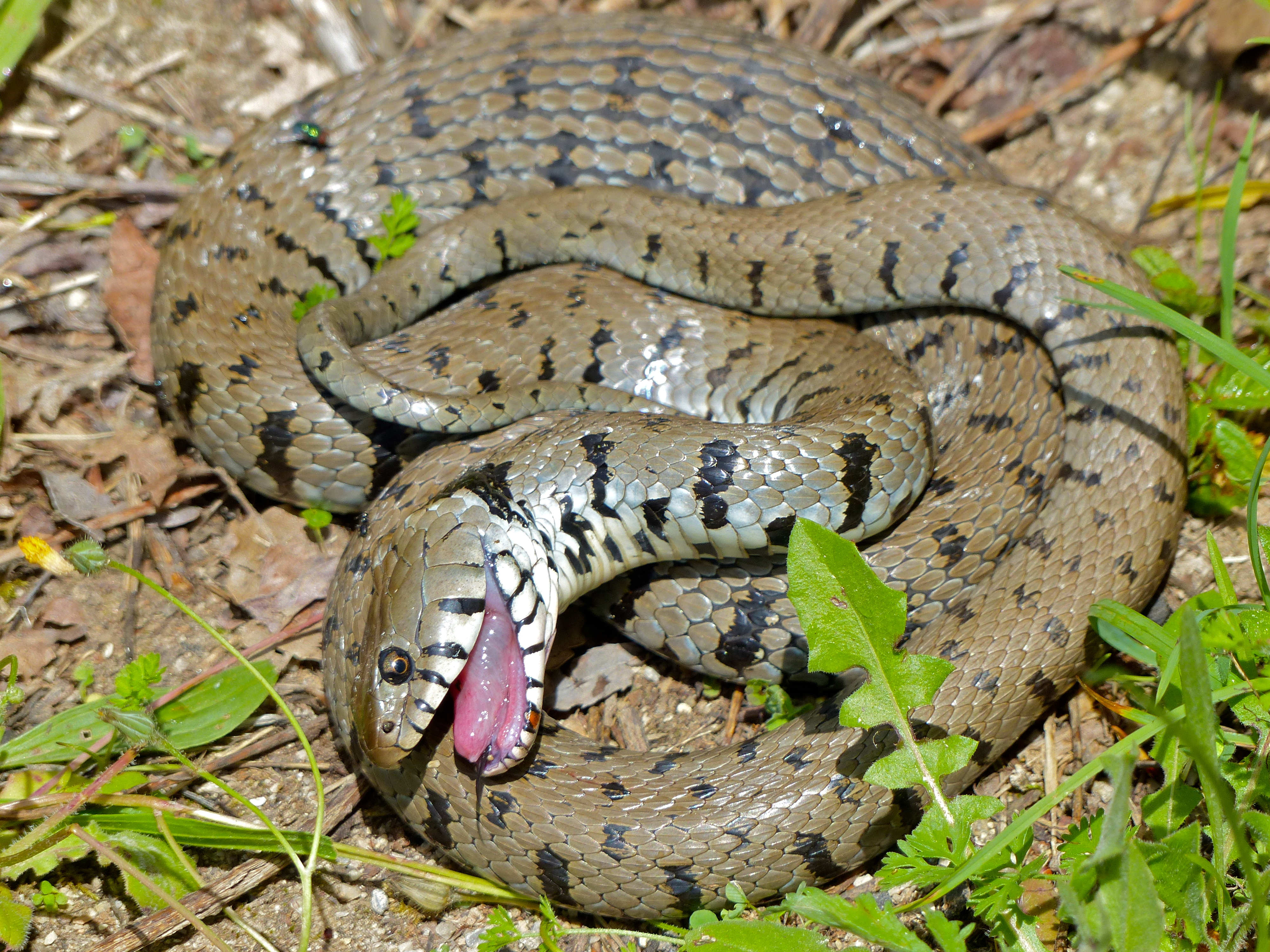 Avène, Hérault, FRANCE